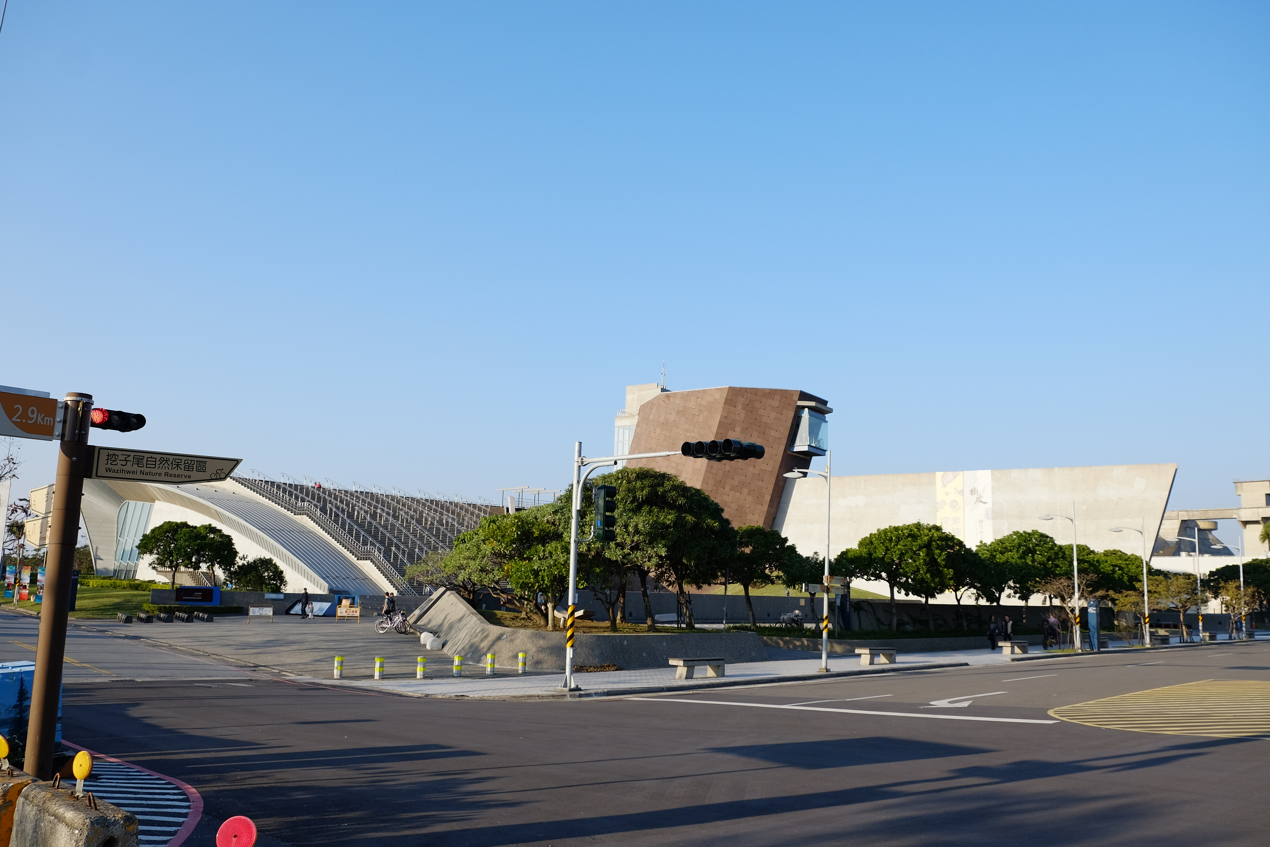 中文（台灣）: 新北市立十三行博物館